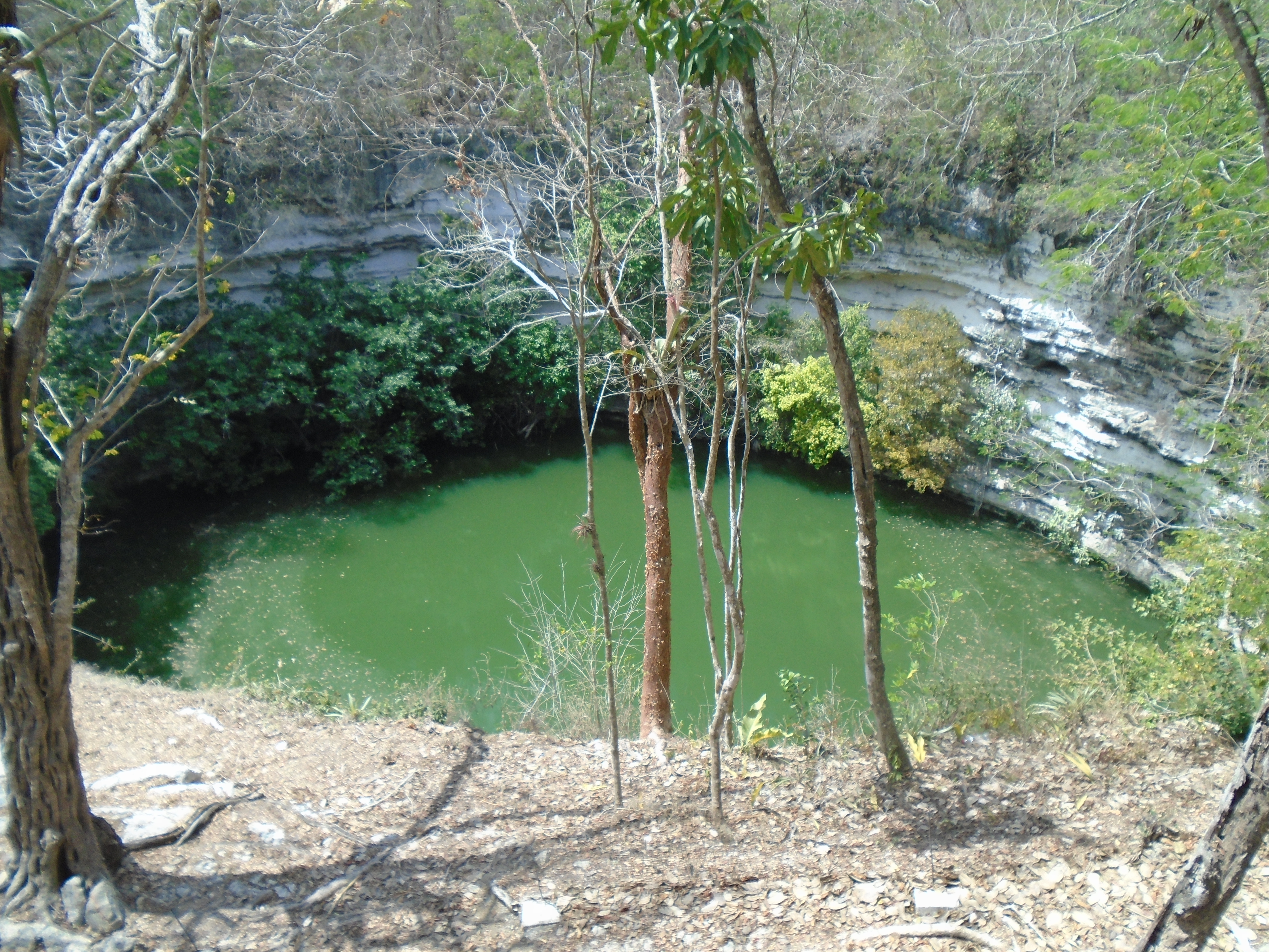 Cenote sagrado de Chichén Itzá